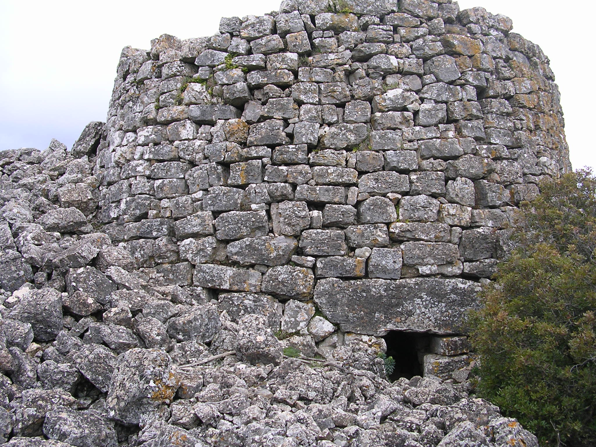 Nuraghe S'Ulimu di Ulassai, torre centrale